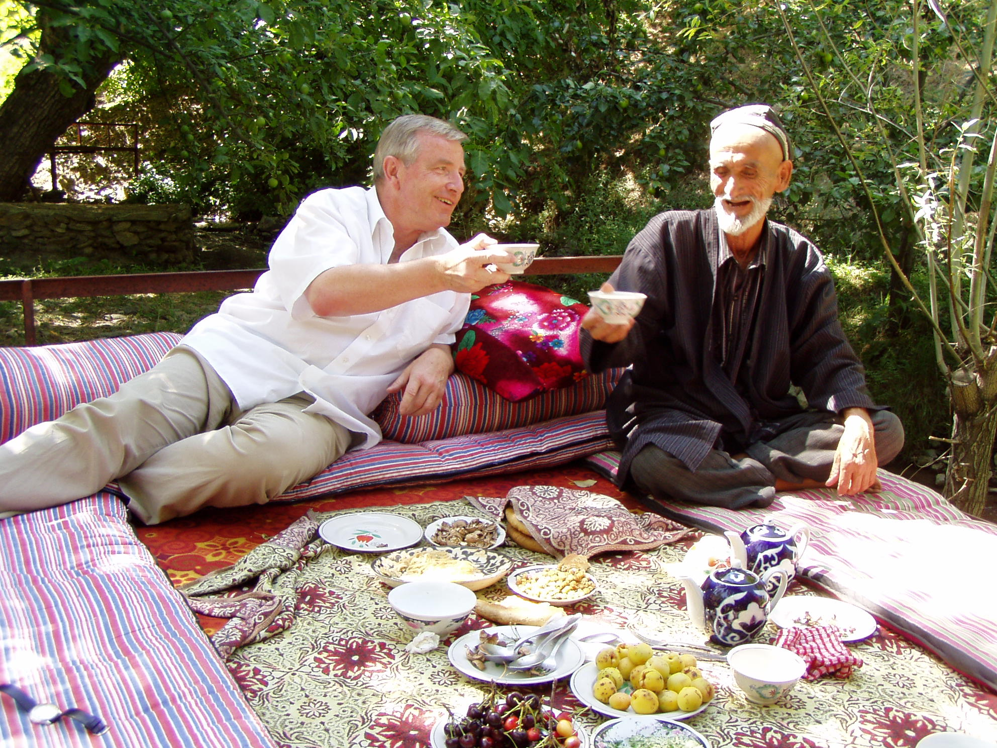 Friendship in Uzbekistan (Sigismund von Dobschütz and his friend Sattor in Hayat Village, North Uzbekistan)